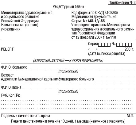 Новый рецептурный бланк форма 148 от 2007 года/